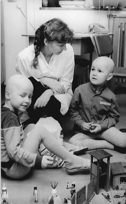 Jena, Universitätskinderklinik, Betreuerin mit Kindern ADN-Kasper 4.5.90 Bez. Gera-Krebskranke Kinder- Über eine lange Zeit versucht Erzieherin Claudia Friedrich, für Frank und Steffen die Mutti ersetzen. Die beiden Jungs müssen sich in der Universitätskinderklinik "Jussuf Ibrahim" Jena, wo sich das einzige Knochenmarktransplantationszentrum der DDR für Kinder befindet, einer langwierigen Behandlung unterziehen. Claudia Friedrich schloß sich der "Elterninitiative für krebskranke Kinder Jena e.V." an, deren Ziel es ist, während der Therapie den Kontakt zwischen Eltern und Kindern zu erleichtern.